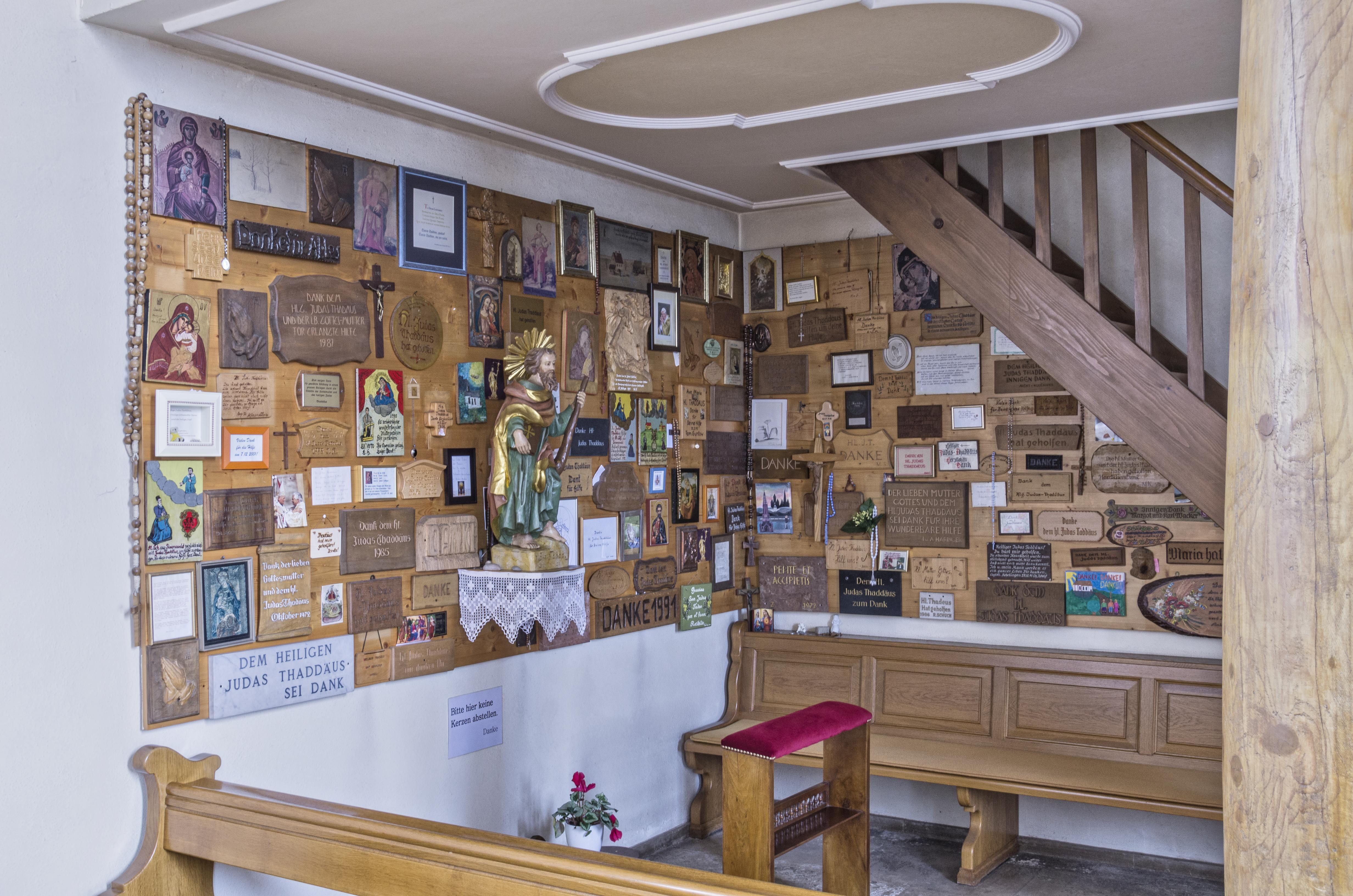 Bilder aus St. Märgen Bilder aus der Ohmenkapelle Judas Taddäus Skulptur und Votivecke in der Kirche